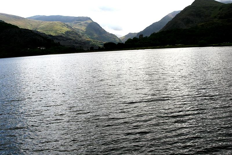 Llyn Padarn, Llanberis, Gwynedd